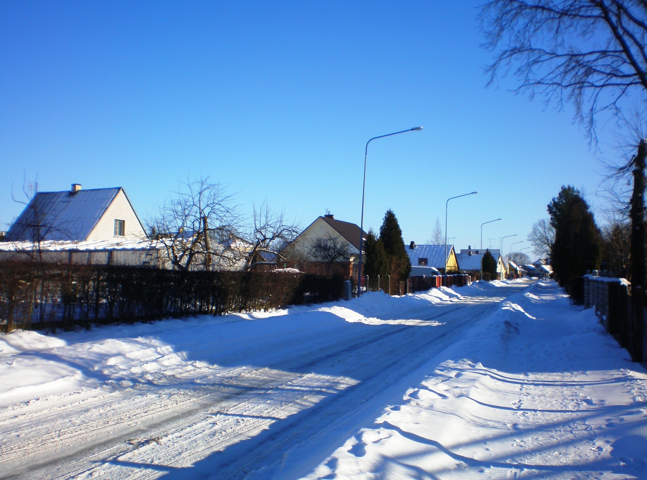 Janušavos gatvė, Kėdainiai